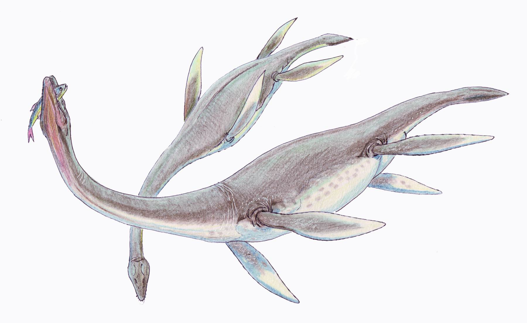 Plesiosaurus dolichodeirus